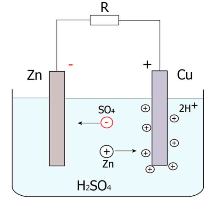 Schemat ogniwa Volty z zaznaczonym przepływem ładunków